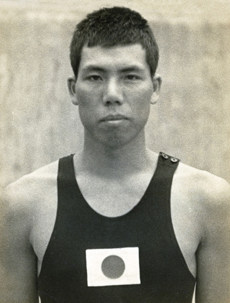 Masaji Kiyokawa